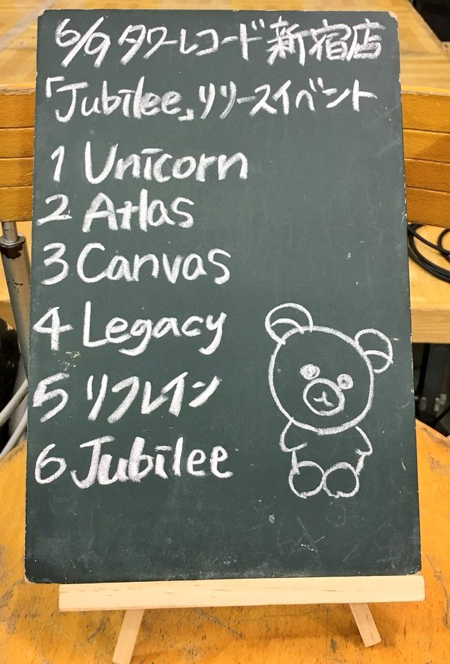 amiinAセトリボード(20180609(1))